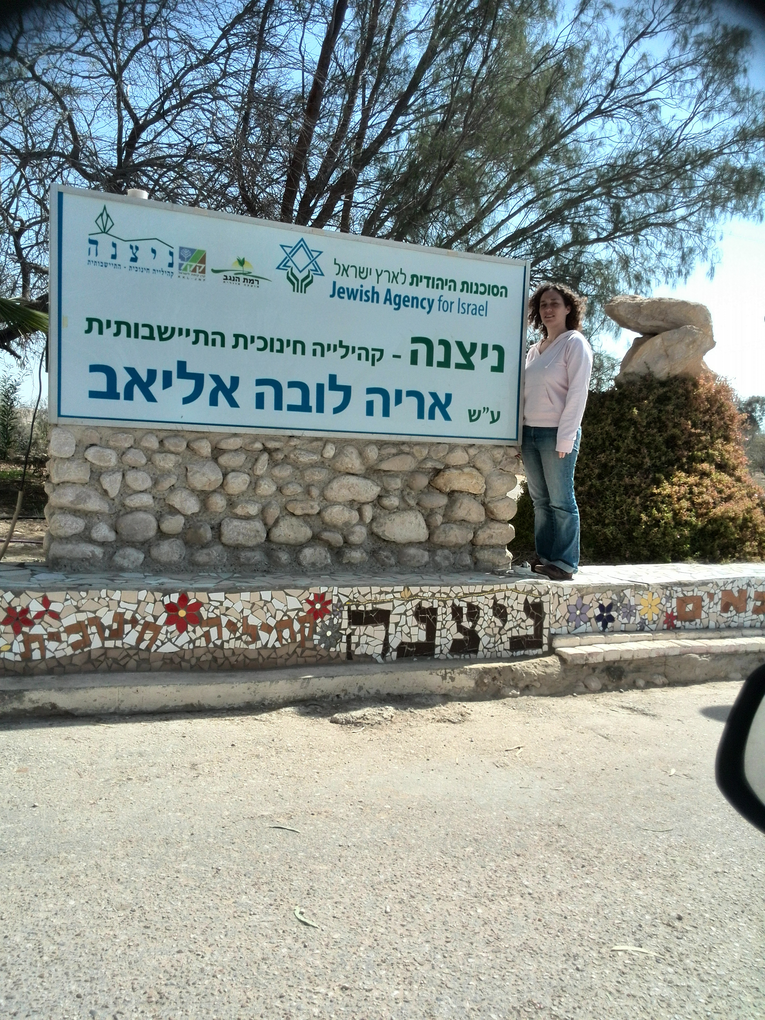 ניצנה ע"ש אריה לובה אליאב